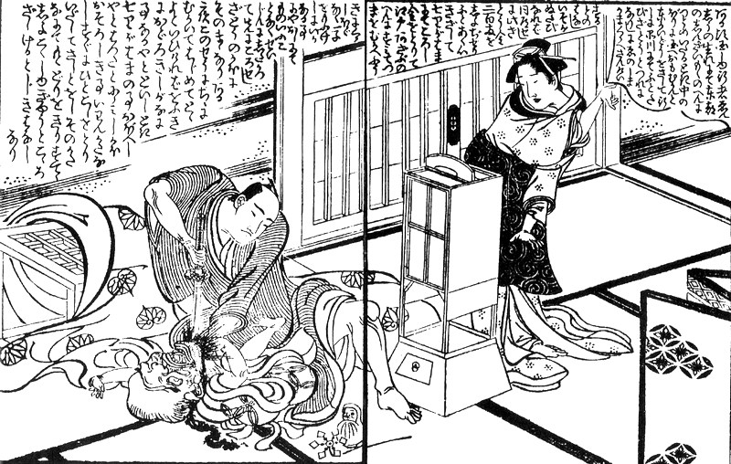 "Rokubu goroshi" from Momonga-Kokaidan (模文画今怪談)